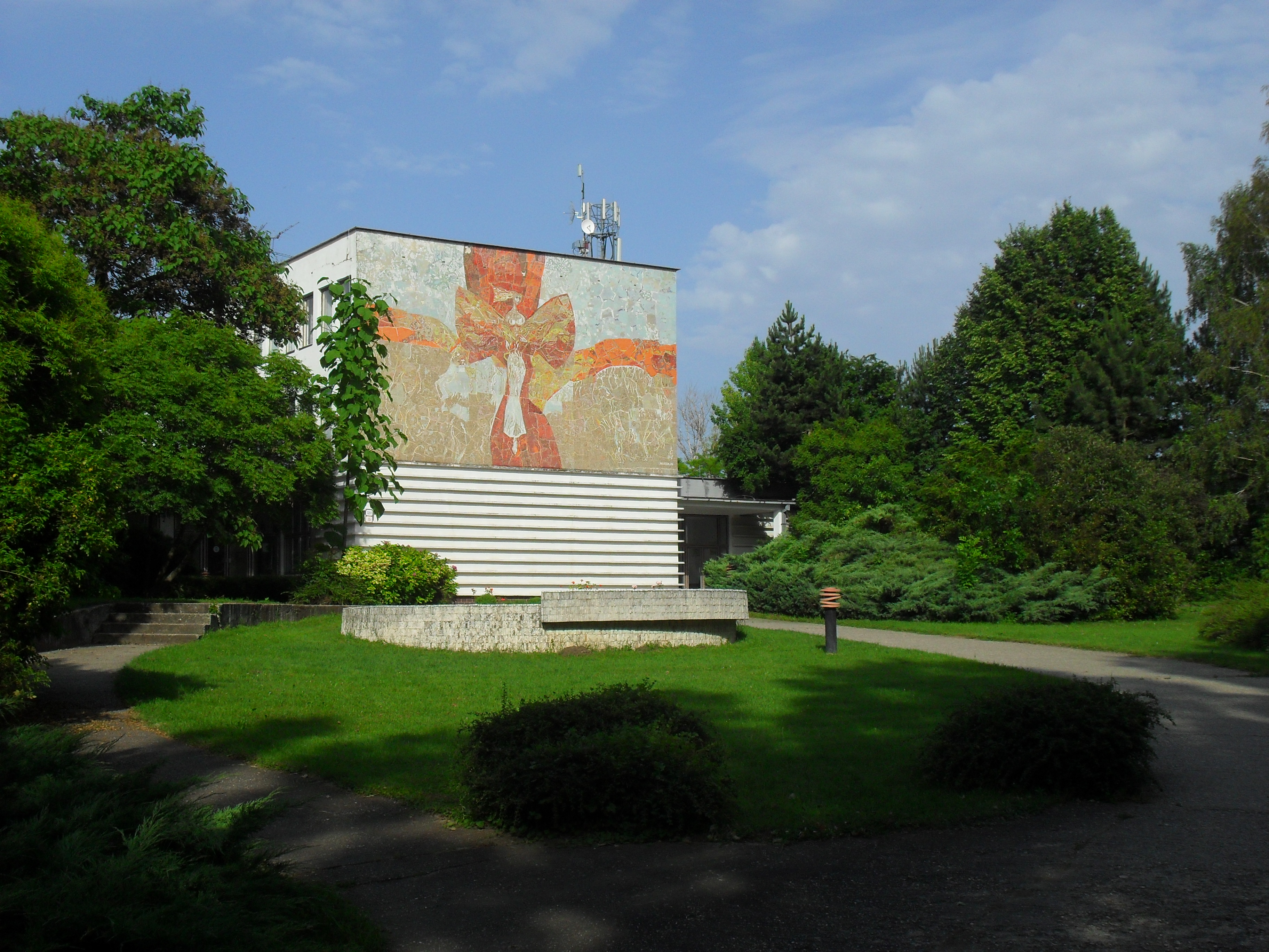 Perbete - a mezőgazdasági szövetkezet székháza